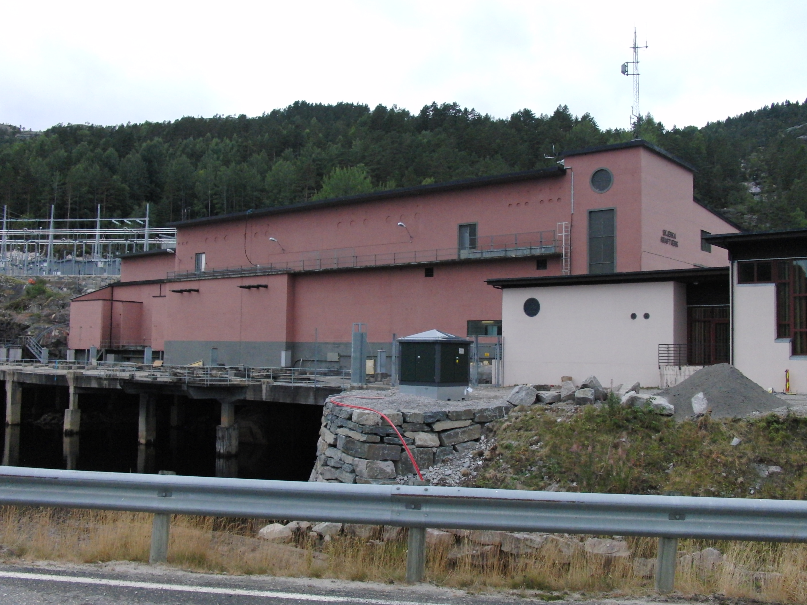 Skjerka gamle kraftverk